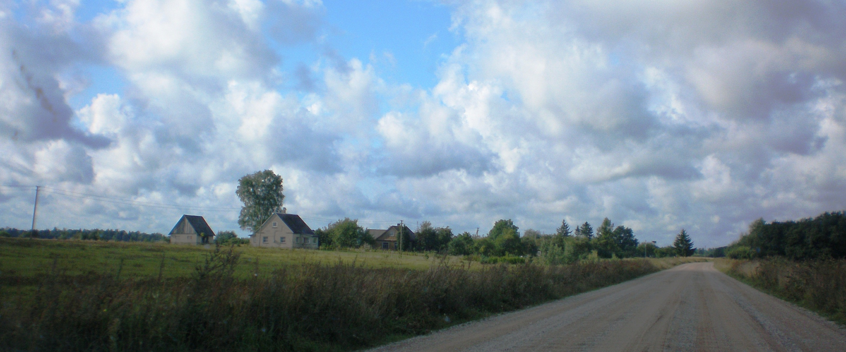 Guptilčiai, Kėdainių raj., Lietuva